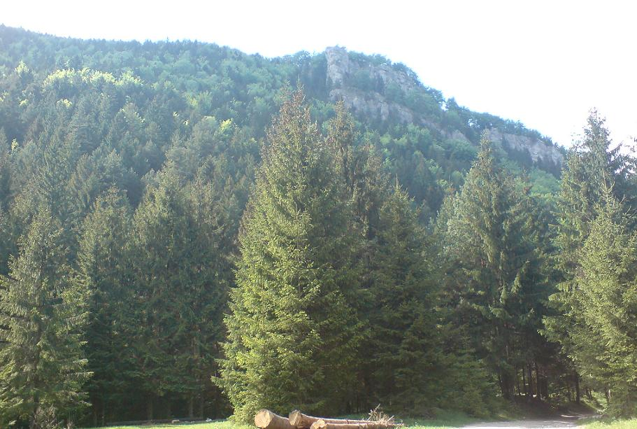 Pohľad z Višňovskej doliny